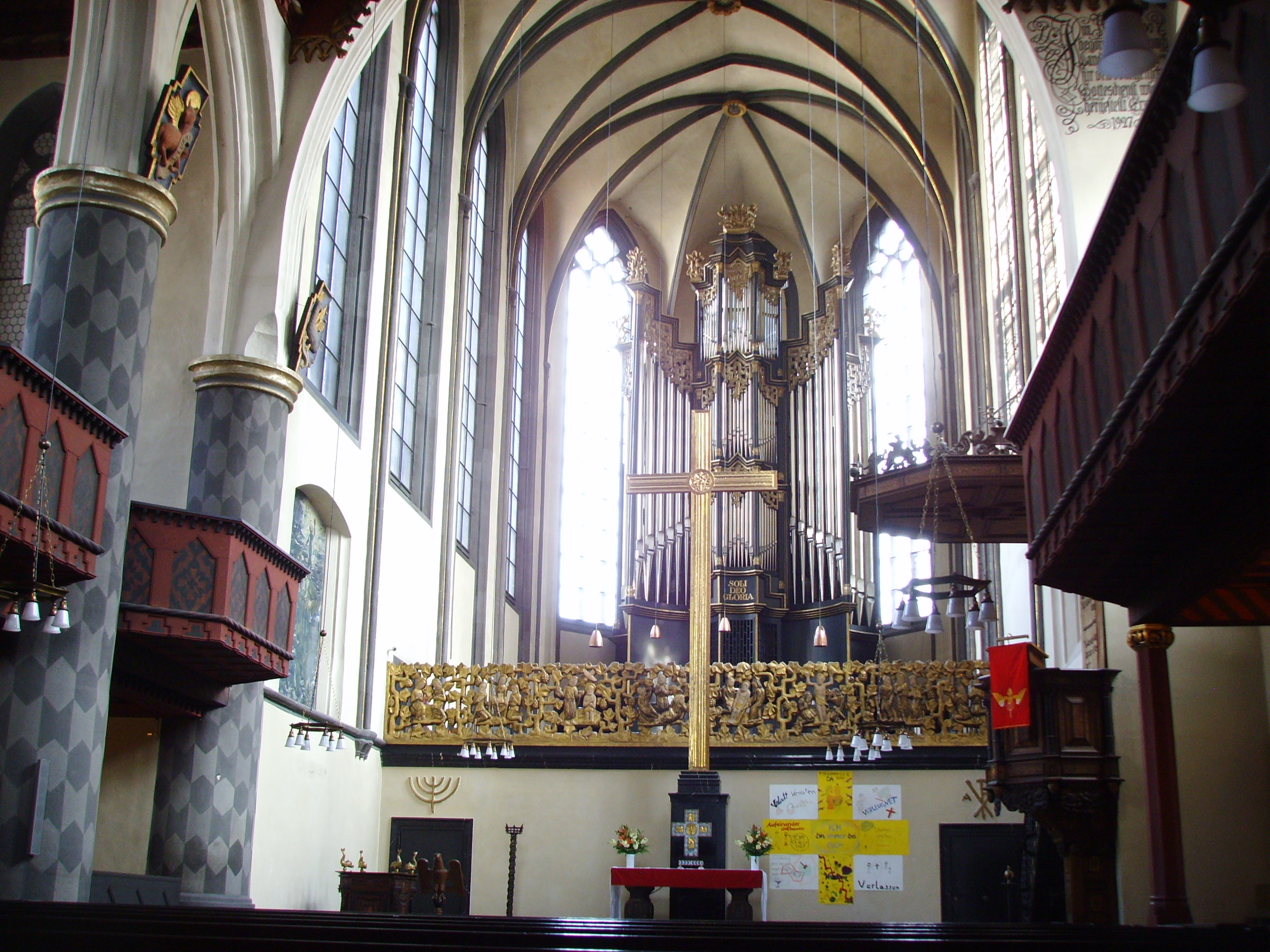 Marburg, Universitätskirche, innen. Die Universitätskirche ist das einzige noch bestehende Gebäude aus dem ehemaligen Dominikanerkloster, das nach Gründung der Universität 1527 der Universität überlassen wurde.